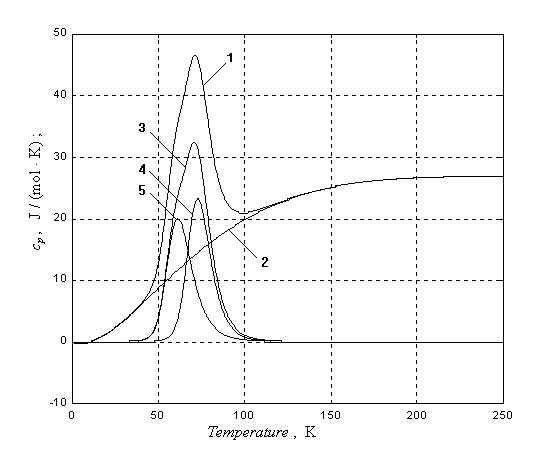 Аномальный пик на кривой теплоёмкости гафния